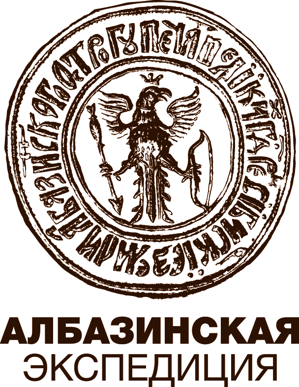 Культурно-исторический проект "Албазинская экспедиция"